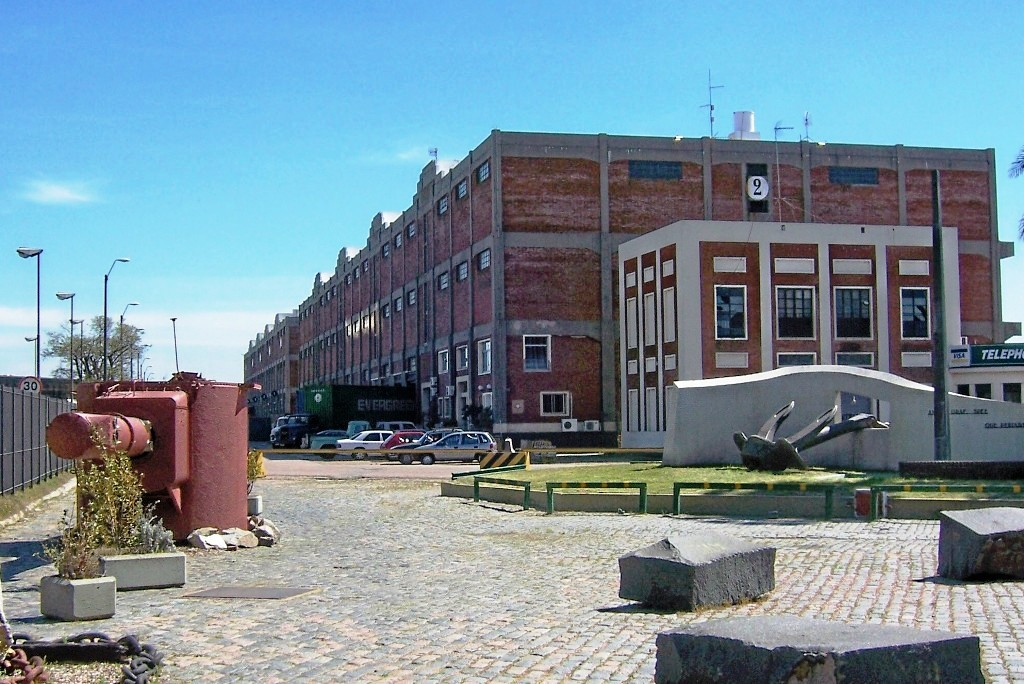 Vista de un Ancla del Spee , integrada a un monumento que conmemora la Batalla del Rio de la Plata , al costado del Acceso Principal del Puerto de Montevideo. Casualmente se encuentra depositado a su lado el telémetro del Graf Spee, recuperado recientemente .